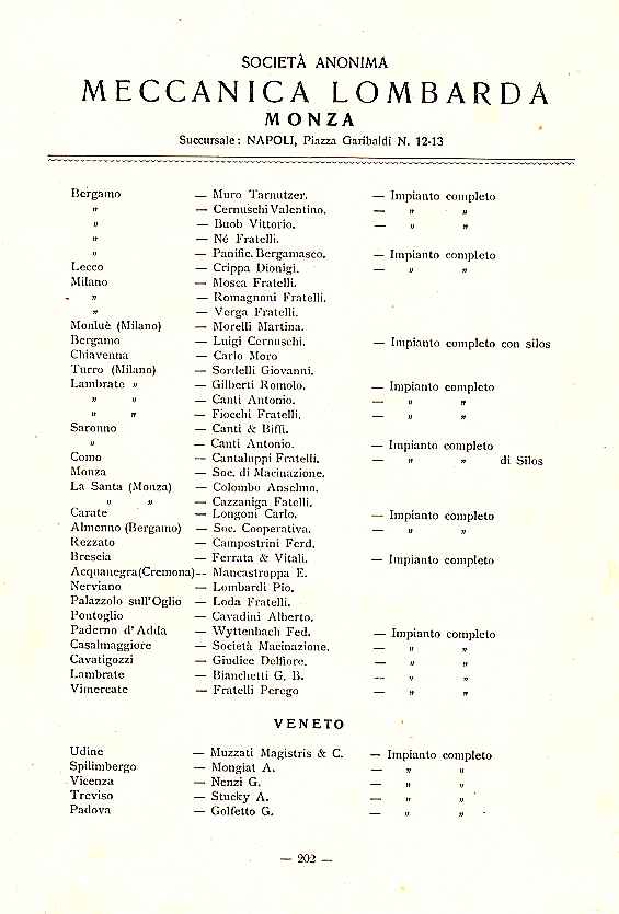 Società Anonima Meccanica Lombarda - Elenco dei molini eseguiti in Italia e all'estero pag. 202